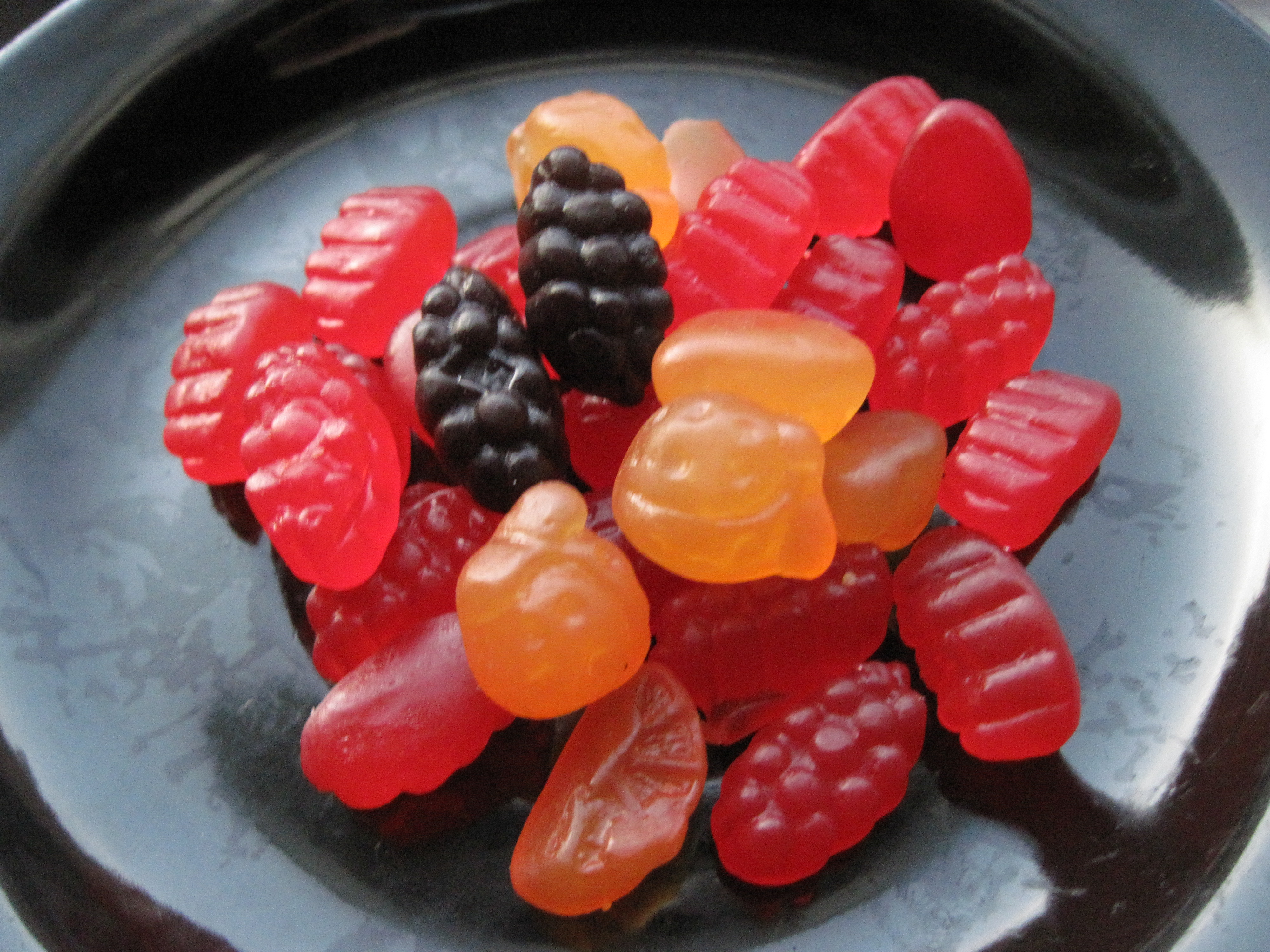 Welch's Fruit Snacks